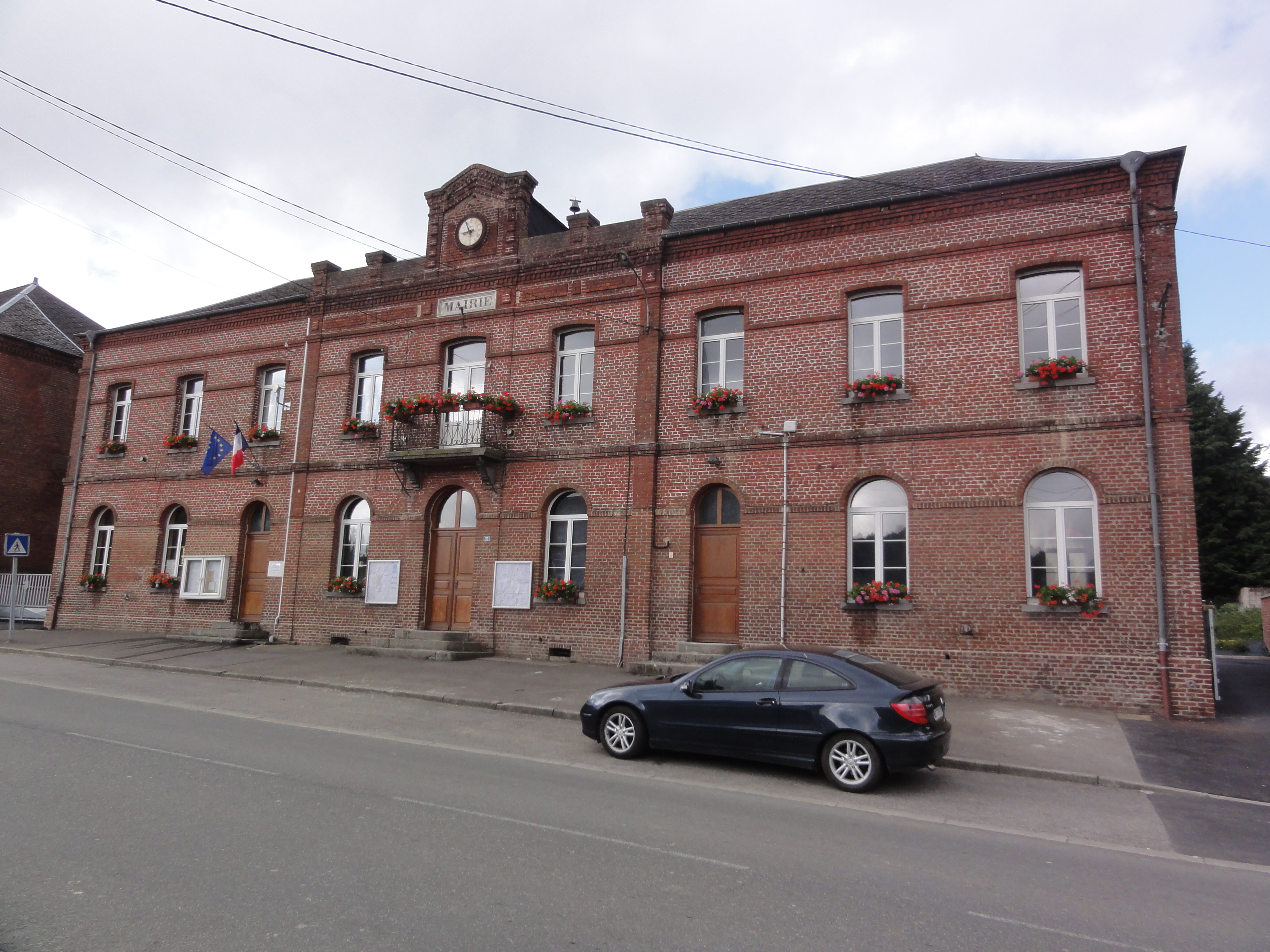 Rocquigny (Aisne) mairie